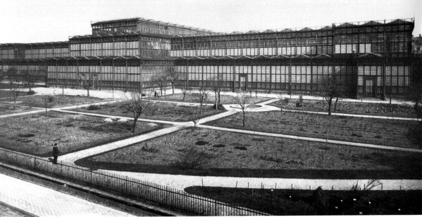 Der Glaspalast in München - Ansicht von Nordwesten Fotografie vor 1932